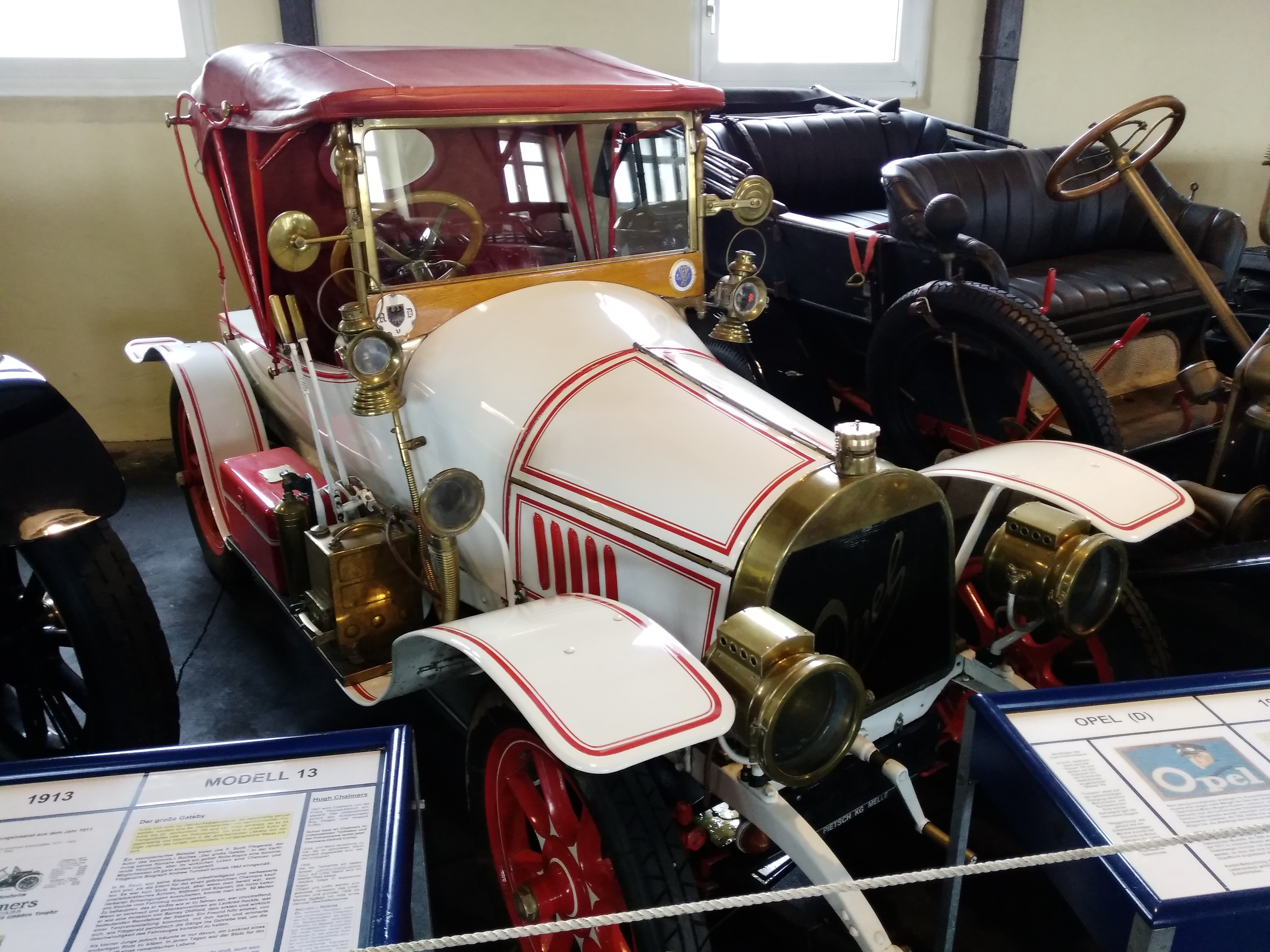 1911 Opel Torpedo Automuseum Melle 24.03.2018